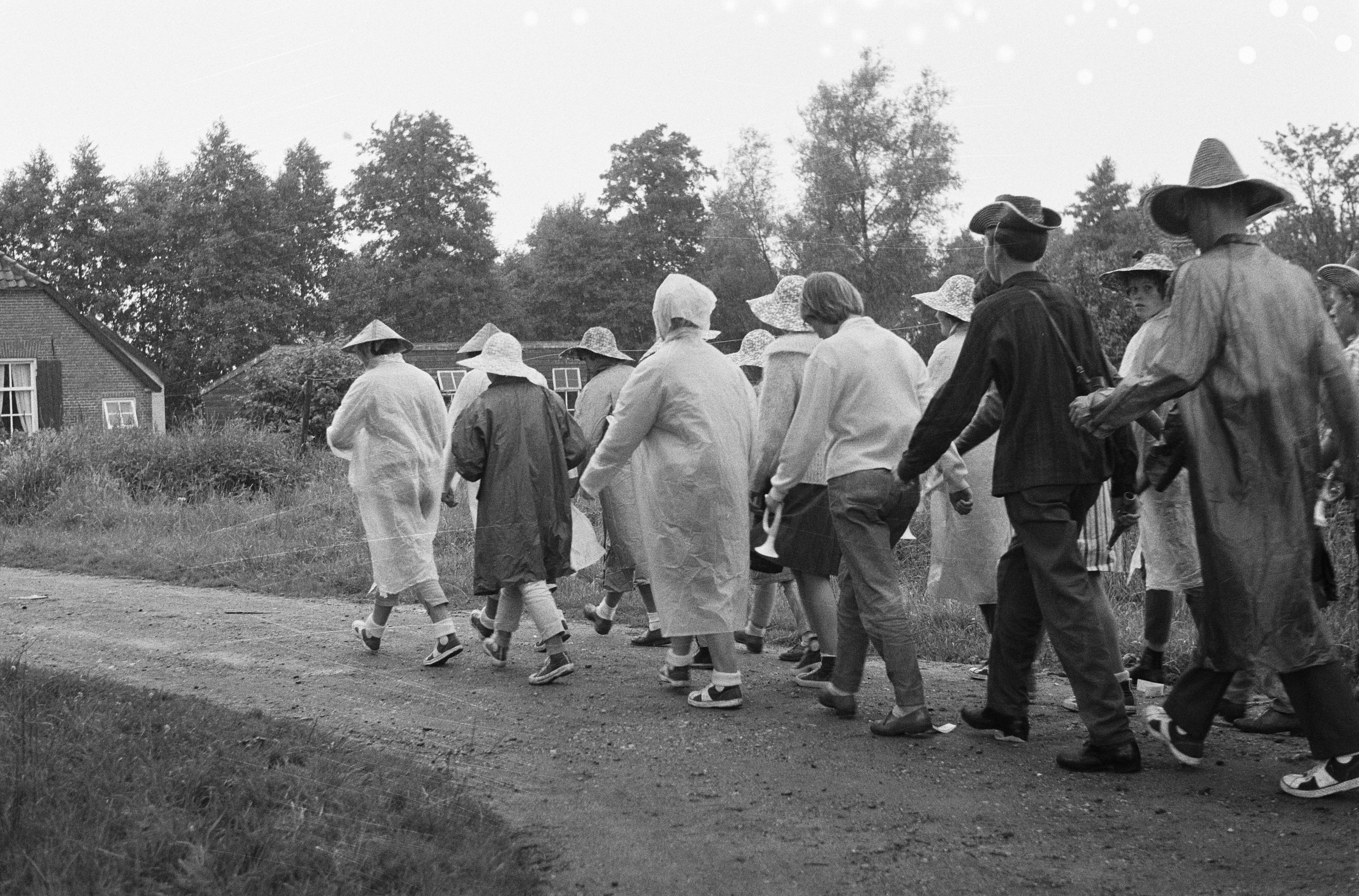 Collectie / Archief : Fotocollectie Anefo Reportage / Serie : [ onbekend ] Beschrijving : Vierdaagse Apeldoorn gestart Datum : 27 juli 1960 Locatie : Apeldoorn, Gelderland Trefwoorden : VIERDAAGSE Fotograaf : Pot, Harry / Anefo Auteursrechthebbende : Nationaal Archief Materiaalsoort : Negatief (zwart/wit) Nummer archiefinventaris : bekijk toegang 2.24.01.05 Bestanddeelnummer : 911-4583